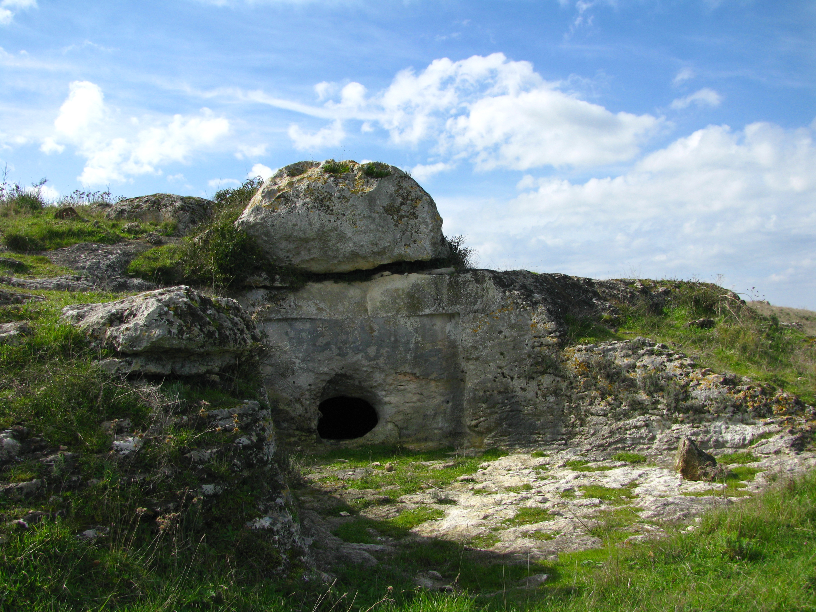 Una domus a prospetto architettonico